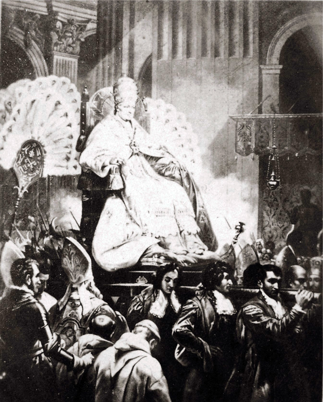 Papst Pius IX., letzter Fürst im Kirchenstaat